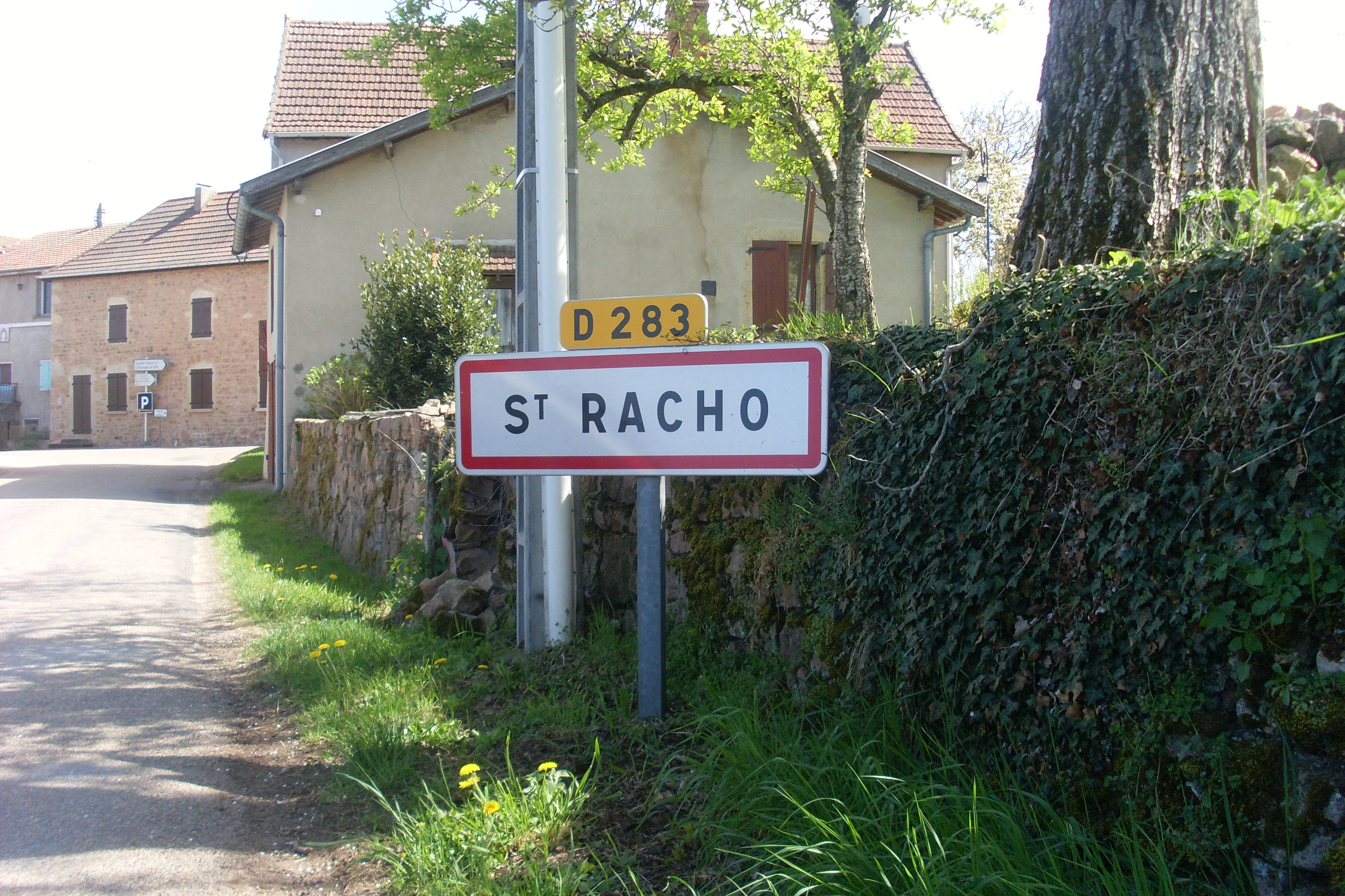 Entrée de la ville de Saint-Racho, Saône-et-Loire